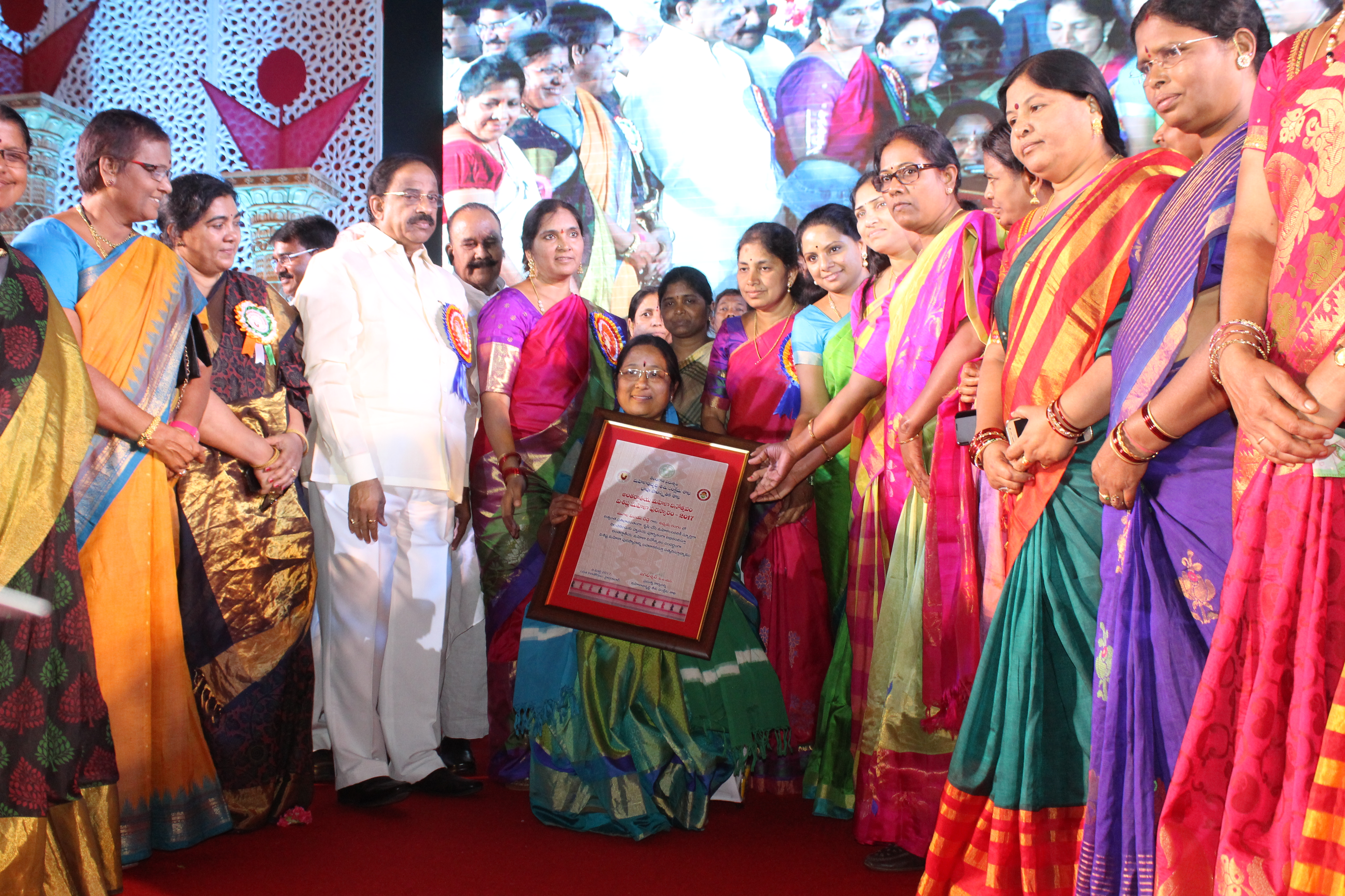 తెలంగాణ రాష్ట్ర విశిష్ట మహిళా పురస్కారం అందుకుంటున్న మూల విజయారెడ్డి